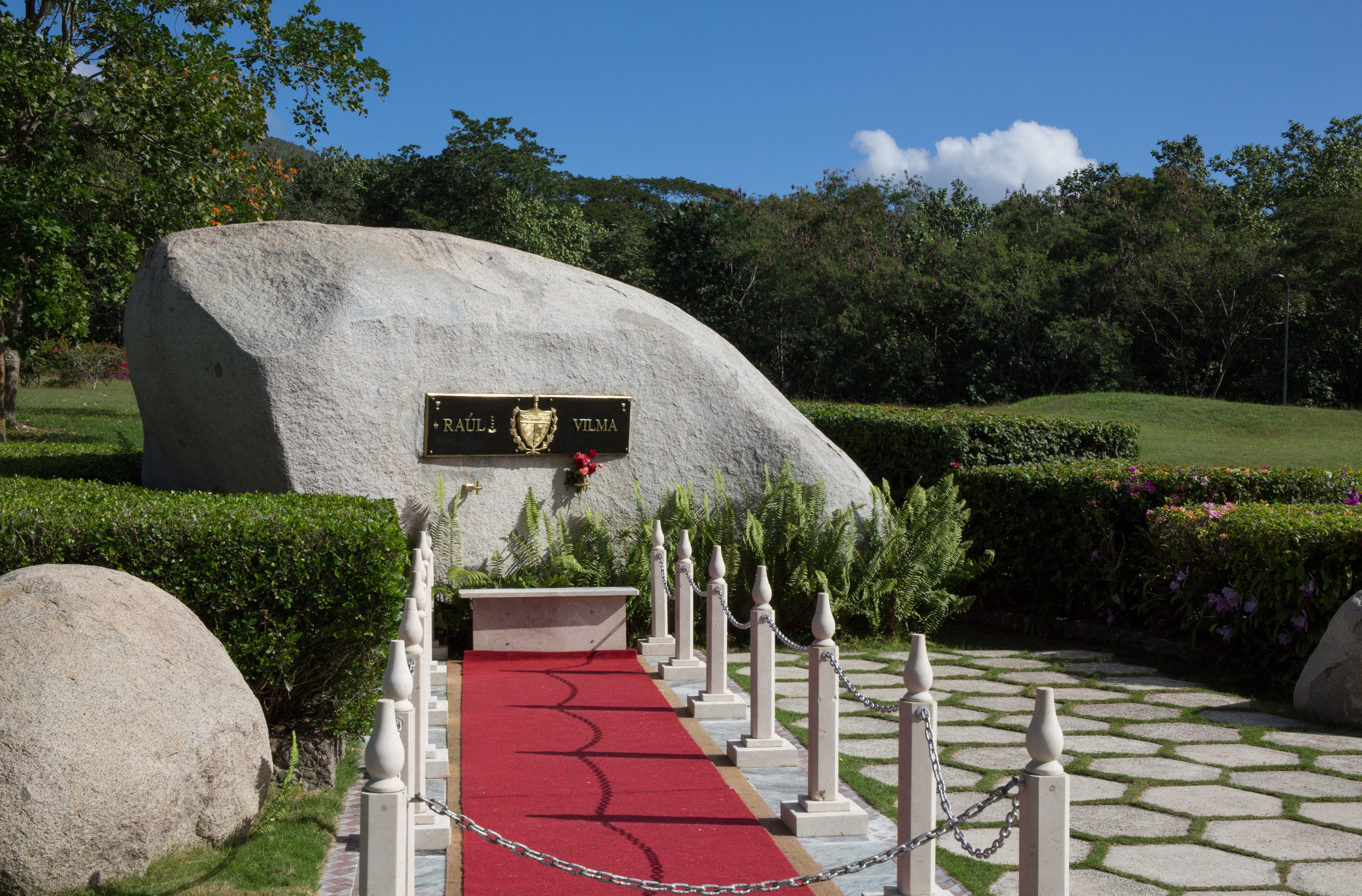 Mayarí arriba, Mausoleo Segundo Frente Oriental Frank País. Grabmal von Vilma Espín.